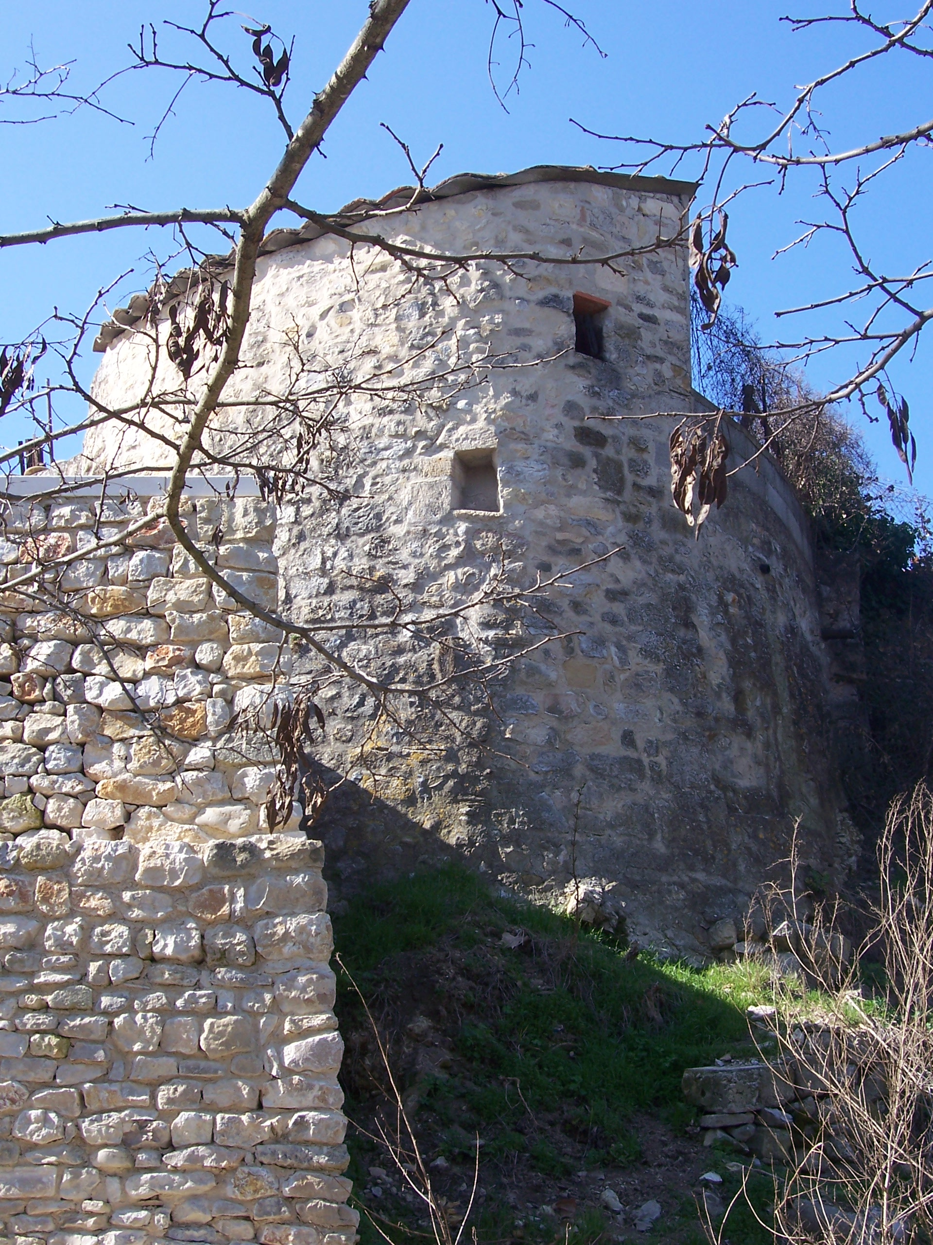 Tour hémicylindrique est (notée N dans l'inventaire du patrimoine)